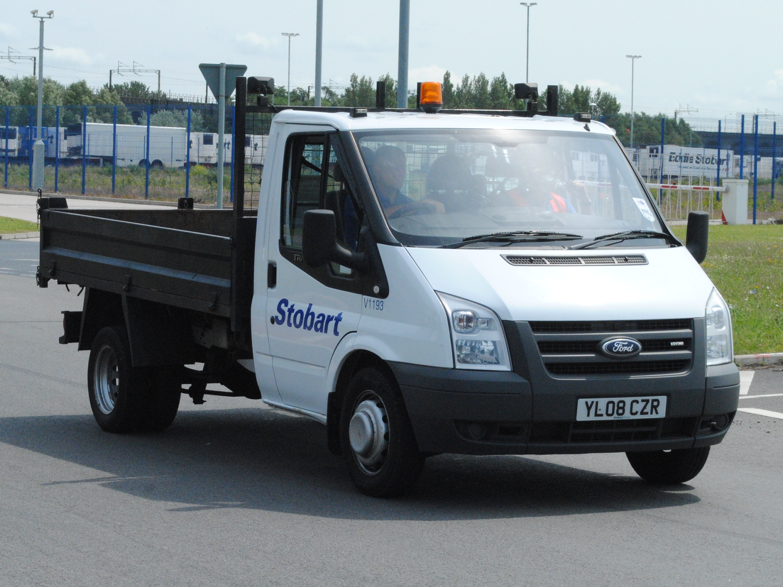 Ford Transit van. seen here in Widnes